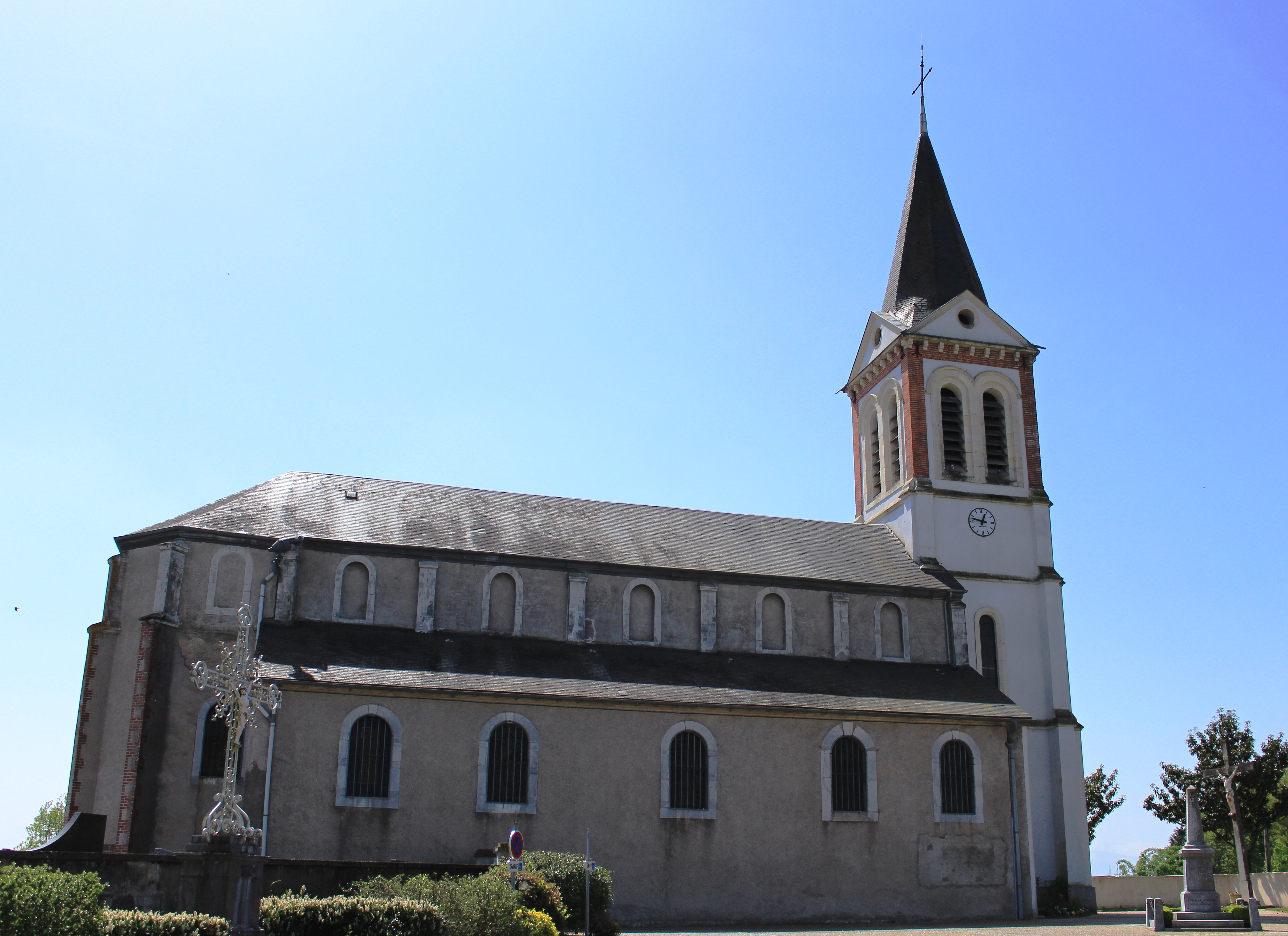 Église Saint-Julien de Gardères (Hautes-Pyrénées)